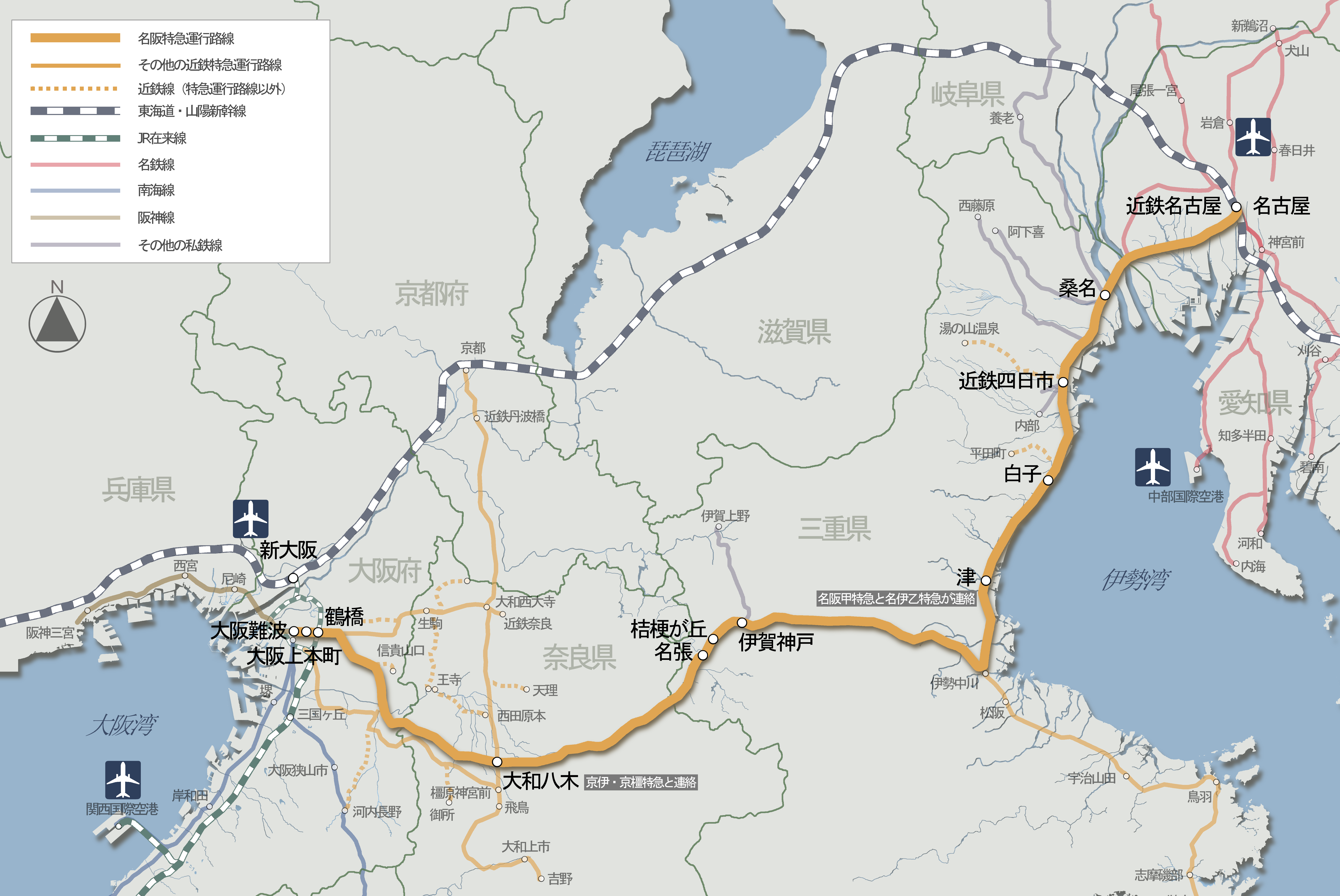 近鉄名阪特急ルートマップ